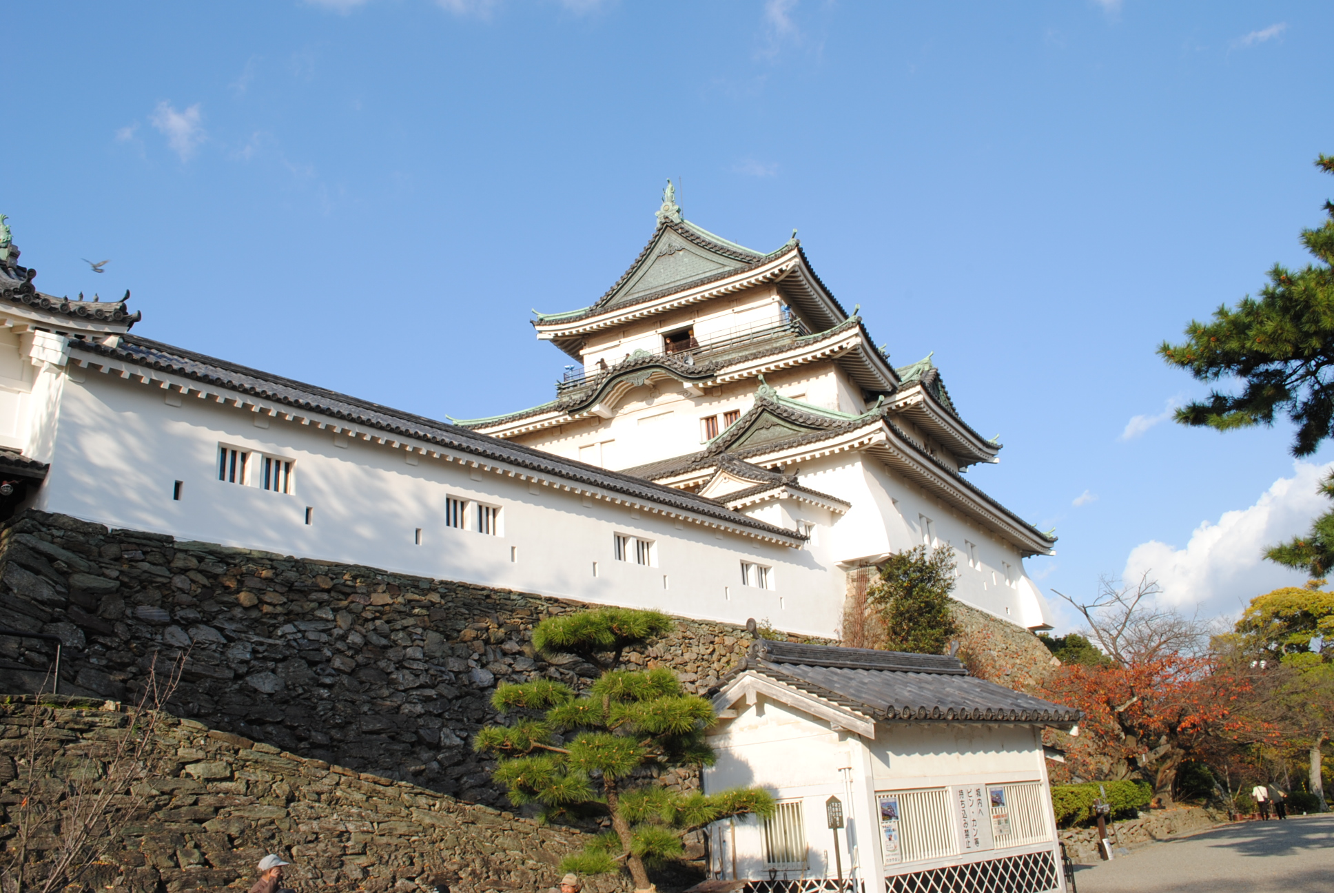 和歌山城 曲輪